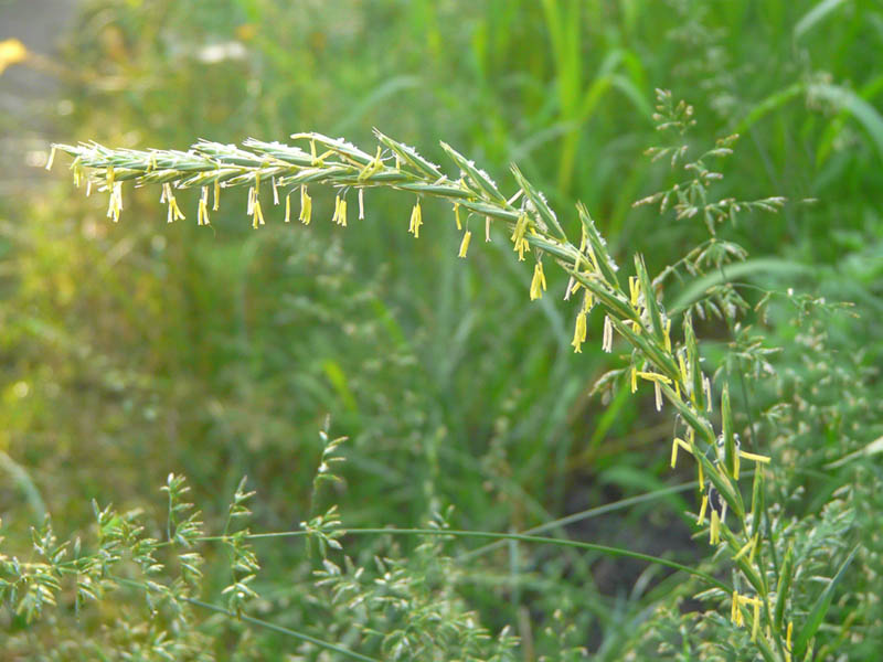 Elytrigia repens (2016).